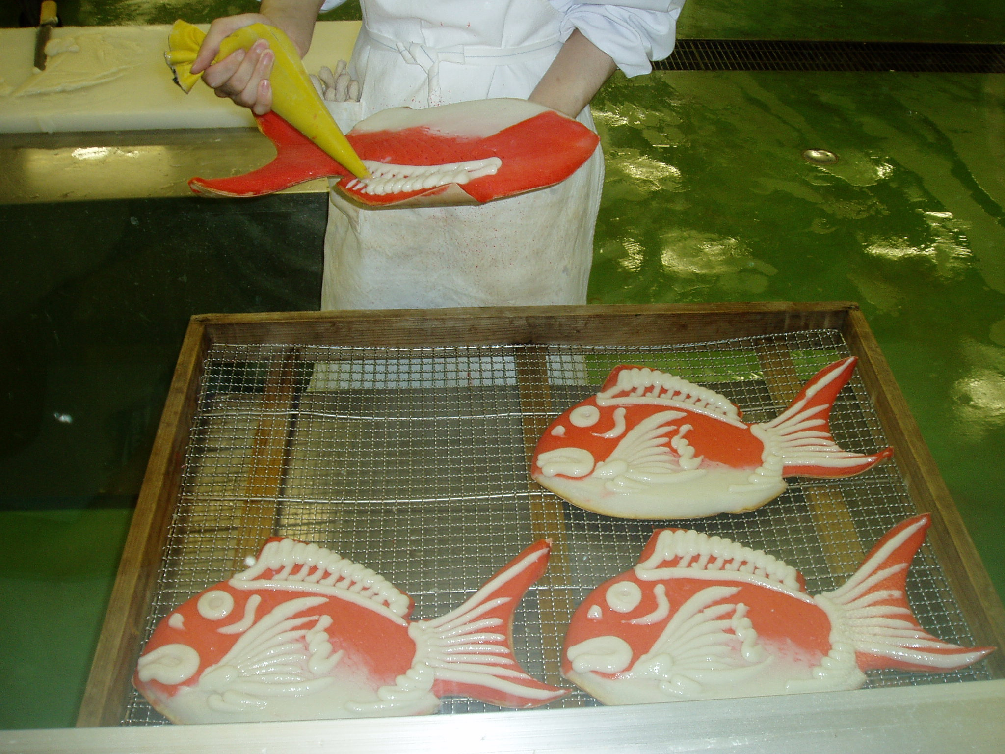 お祝い用のかまぼこ